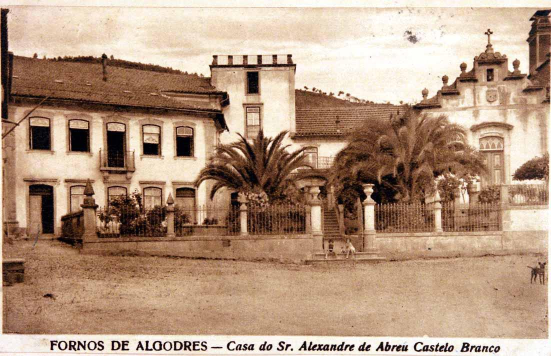 Casa da Torre - Solar dos Abreu Castelo Branco - Fornos de Algodres, 19th century postcard